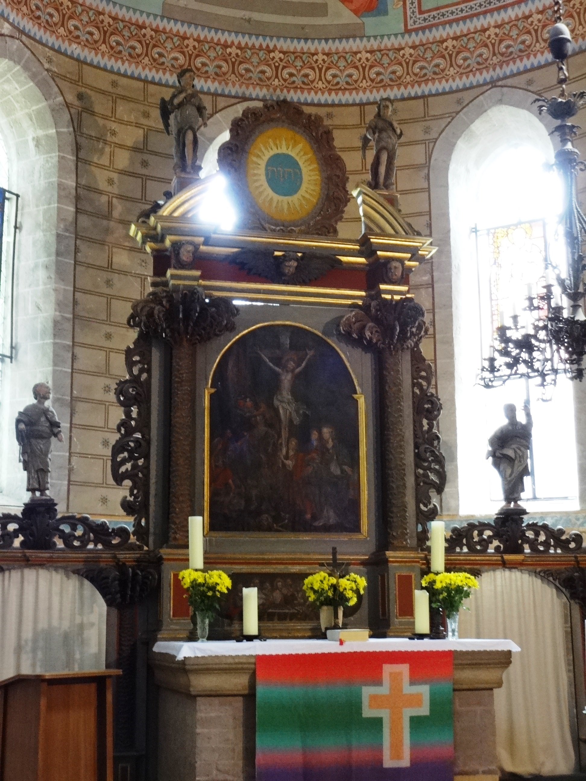 Die Klosterkirche St. Maria entstand im 12. Jahrhundert als Teil eines Zisterzienserklosters. Sie befindet sich in Jüterbog im Landkreis Teltow-Fläming in Brandenburg.